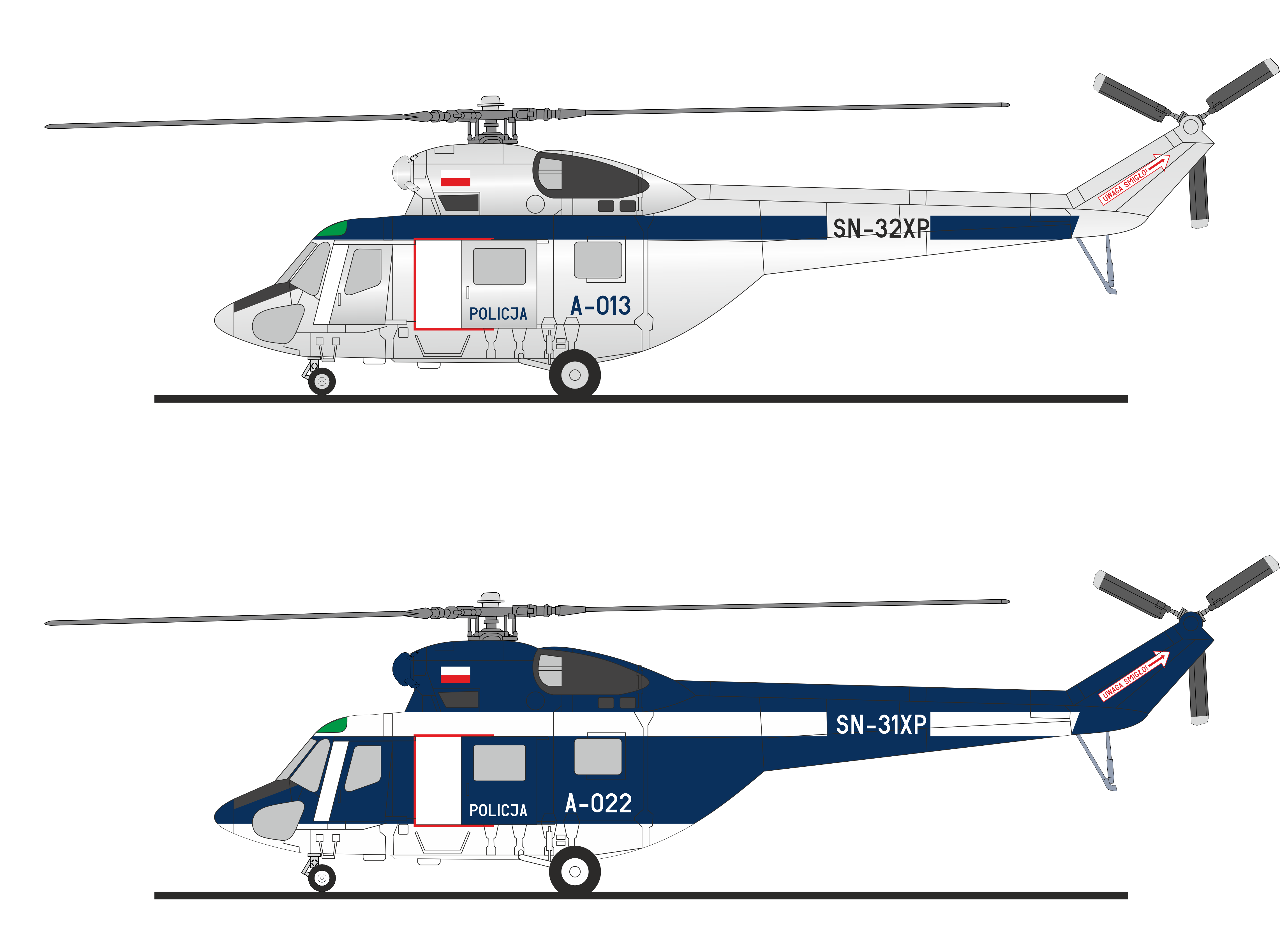 Lotnictwo policji schemat malowania